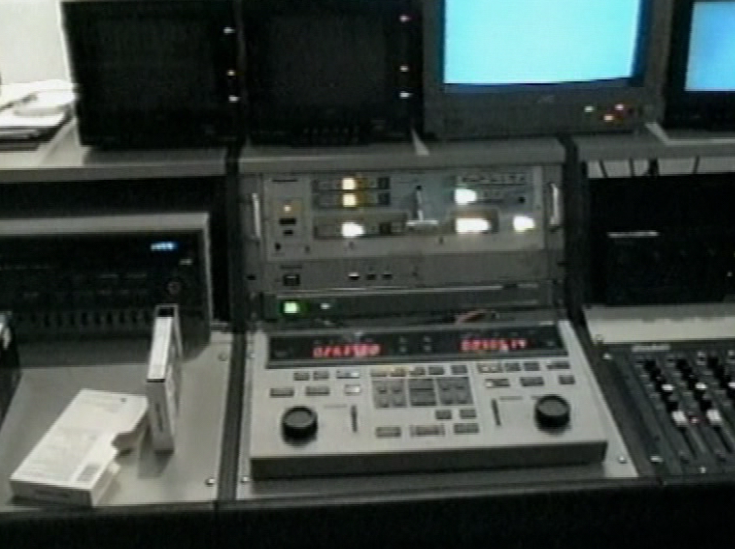 Video-Schnittplatz von WIM Werkstatt für Interkulturelle Medienarbeit, West-Berlin, 1988